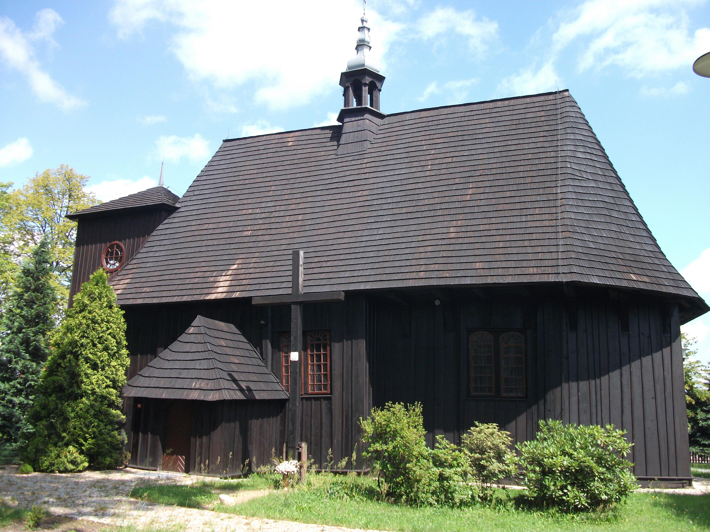 Zabytkowy kościół w Kadłubie k/Wielunia (zabytek nr rejestr. 303-XIV-17)